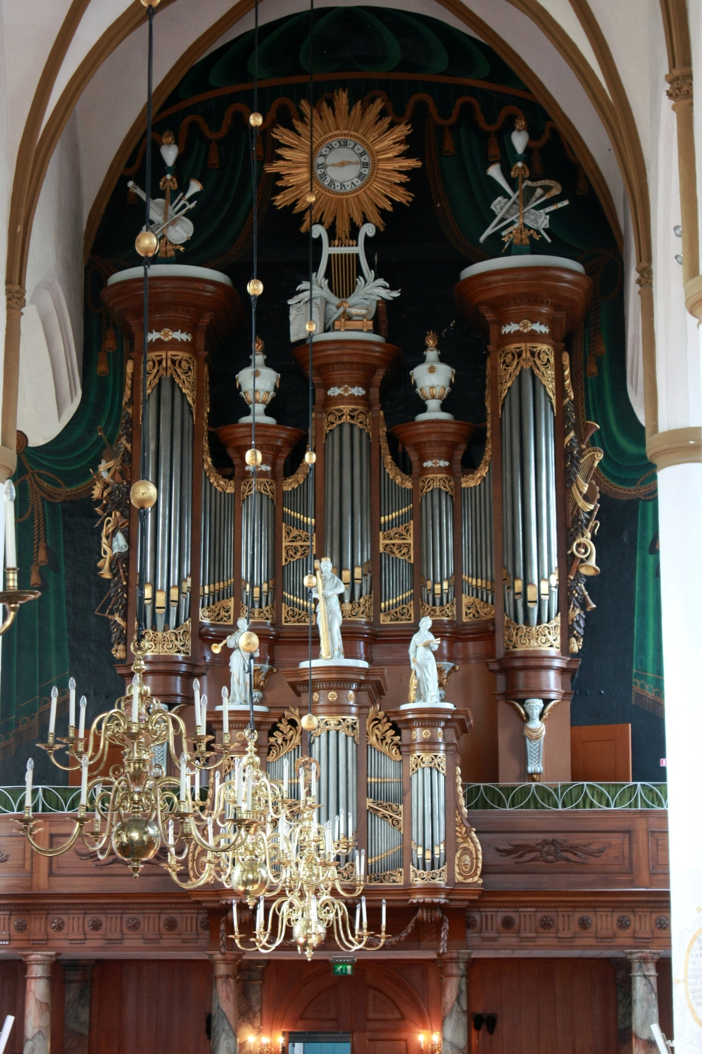 Elburg, Grote- of Sint Nicolaaskerk, Orgel